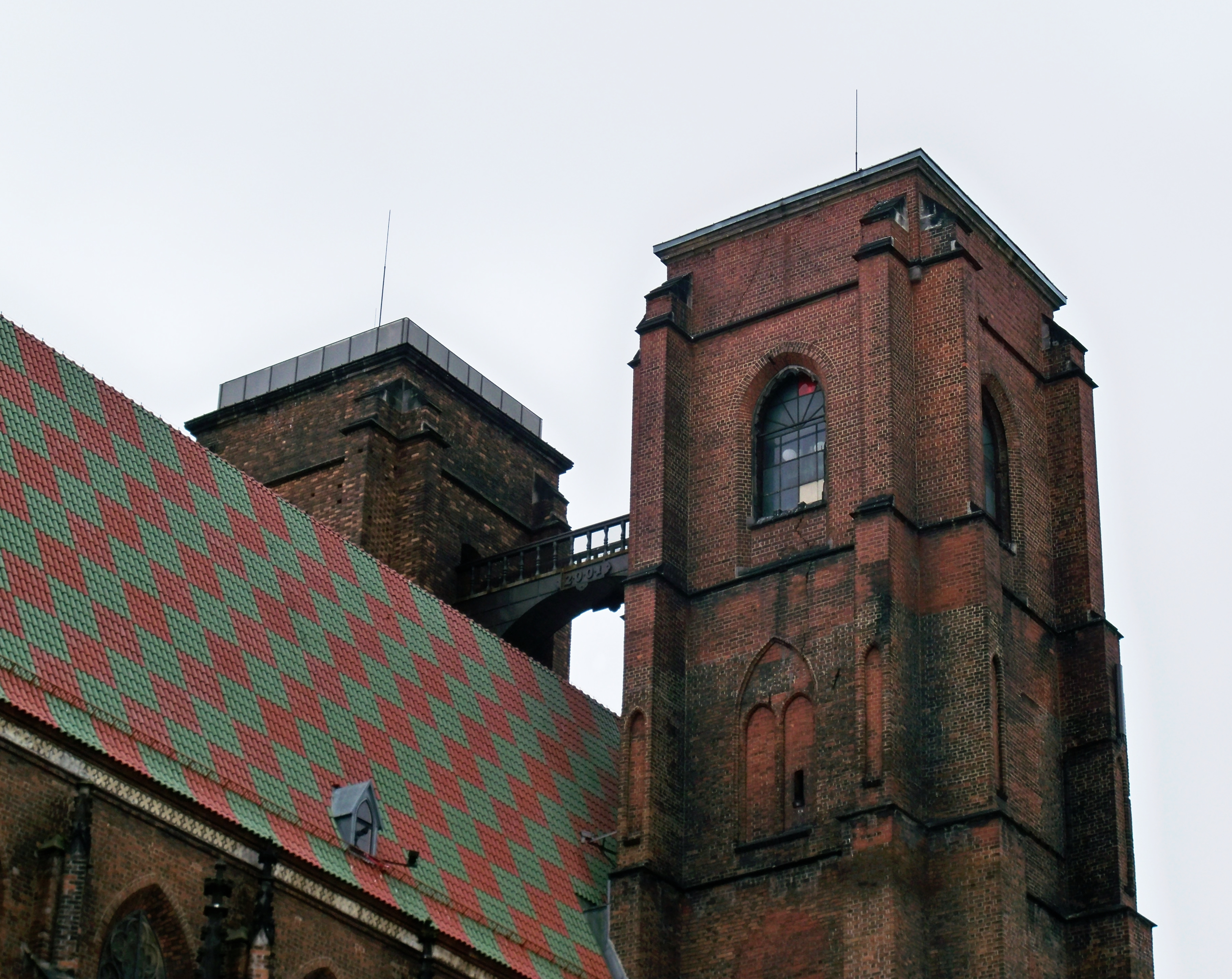 Katedra polskokatolickaj we Wrocławiu.